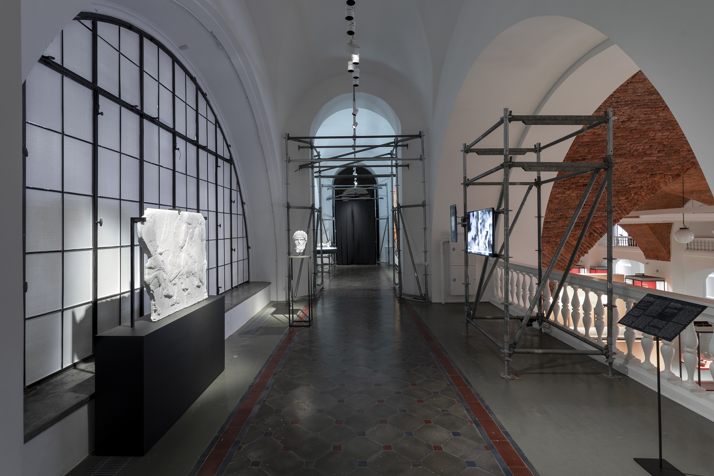 ‘Content Aware Studies’, групповая выставка «Инновация, как художественный прием», Эрмитаж, Санкт-Петербург, Россия, 2018